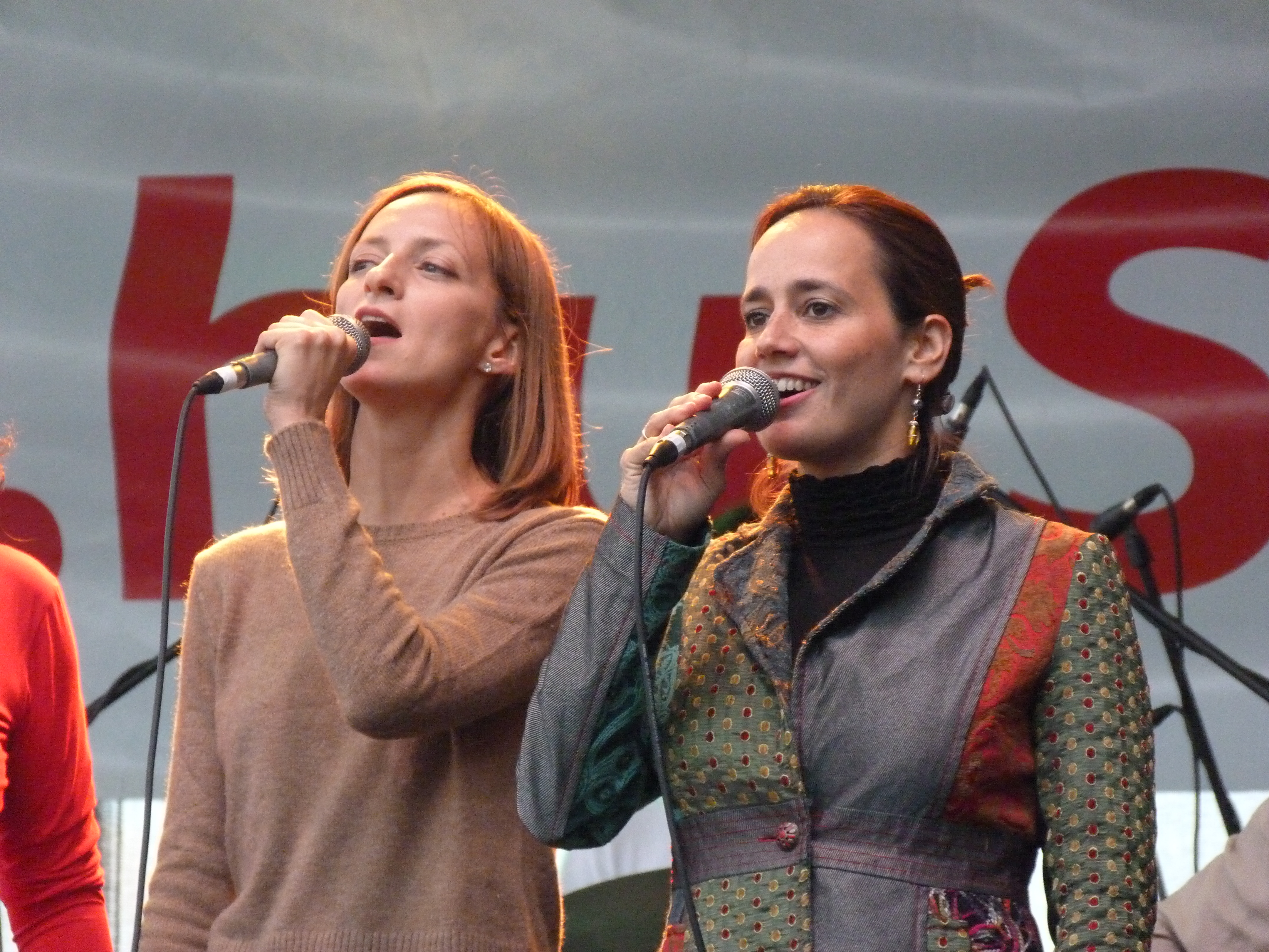 A felvétel 2014. szeptember 12-én, pénteken készült Budapesten, a 23. Budavári Borfesztiválon. Nagyszínpad, a Makám együttes és vendégei. Az együttes tagjai: Krulik Zoltán - gitár Korzenszky Klára - ének Kuczera Barbara – hegedű, vokál Boros Attila - basszusgitár Eredics Dávid - fúvós hangszerek Keönch László - ütőhangszerek Mohai György - hangmérnök ( Szalóki Ágnes, Lovász Irén. Bognár Szilvia: Katona sirató KATONA SIRATÓ MAKÁM BOGNÁR SZILVIA MIHI 2014 Források Bor és Pia borpiaci szakmai magazin 2014. augusztus Borfesztivál Melléklet 23. Budavári Borfesztivál kiállítási tájékoztató ©© Derzsi Elekes Andor, Budapest, 2014, A kép és filmfelvételek egészben, vagy részletekben másolását, bármilyen úton történő sokszorosítását és felhasználását a szerző ellenérték nélkül, jogutódjaira is kihatóan megengedi. Az engedély kiterjed a kereskedelmi célú hasznosításra is. Kéri azonban nevének feltüntetését a felhasználás során. A Metapolisz sorozat valamennyi képe és filmje Creative Commons alatti valamint kereskedelmi - for profit - célra is felhasználható. Ajánlott hivatkozás: Derzsi Elekes Andor: Metapolisz DVD line